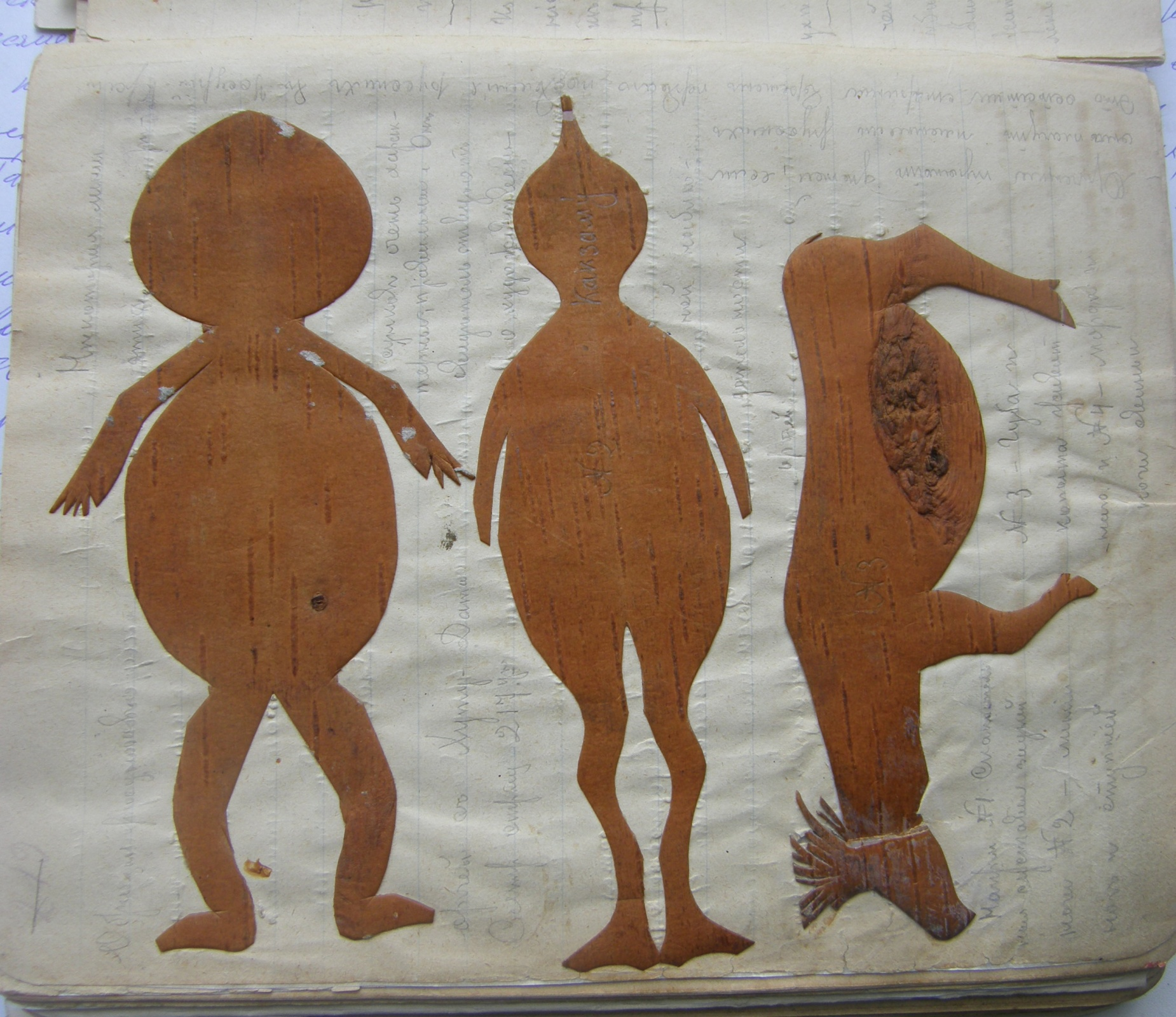 Эвенкийские фигурки людей и оленя из бересты (дневник В. К. Арсеньева, 1917 год)